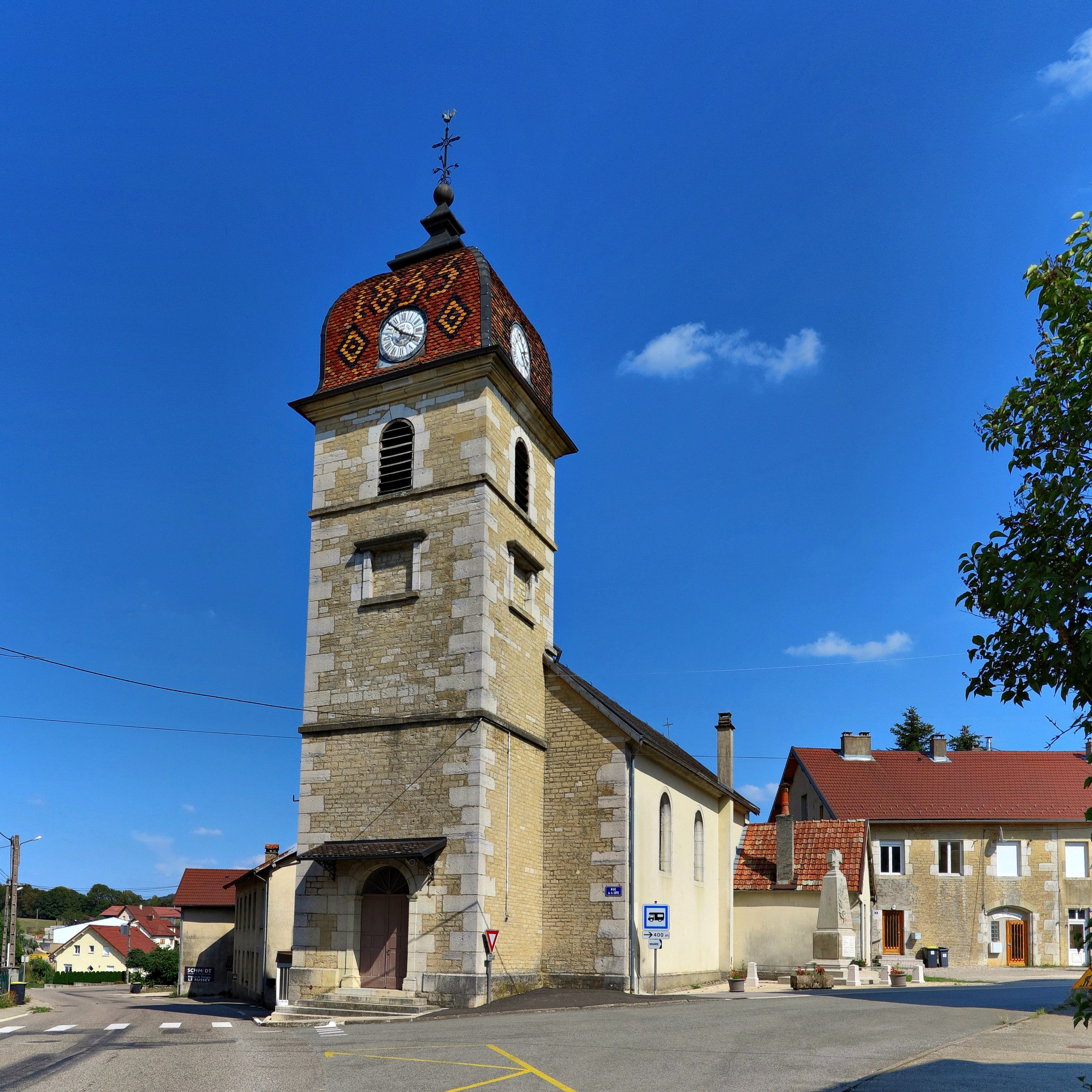 L'église